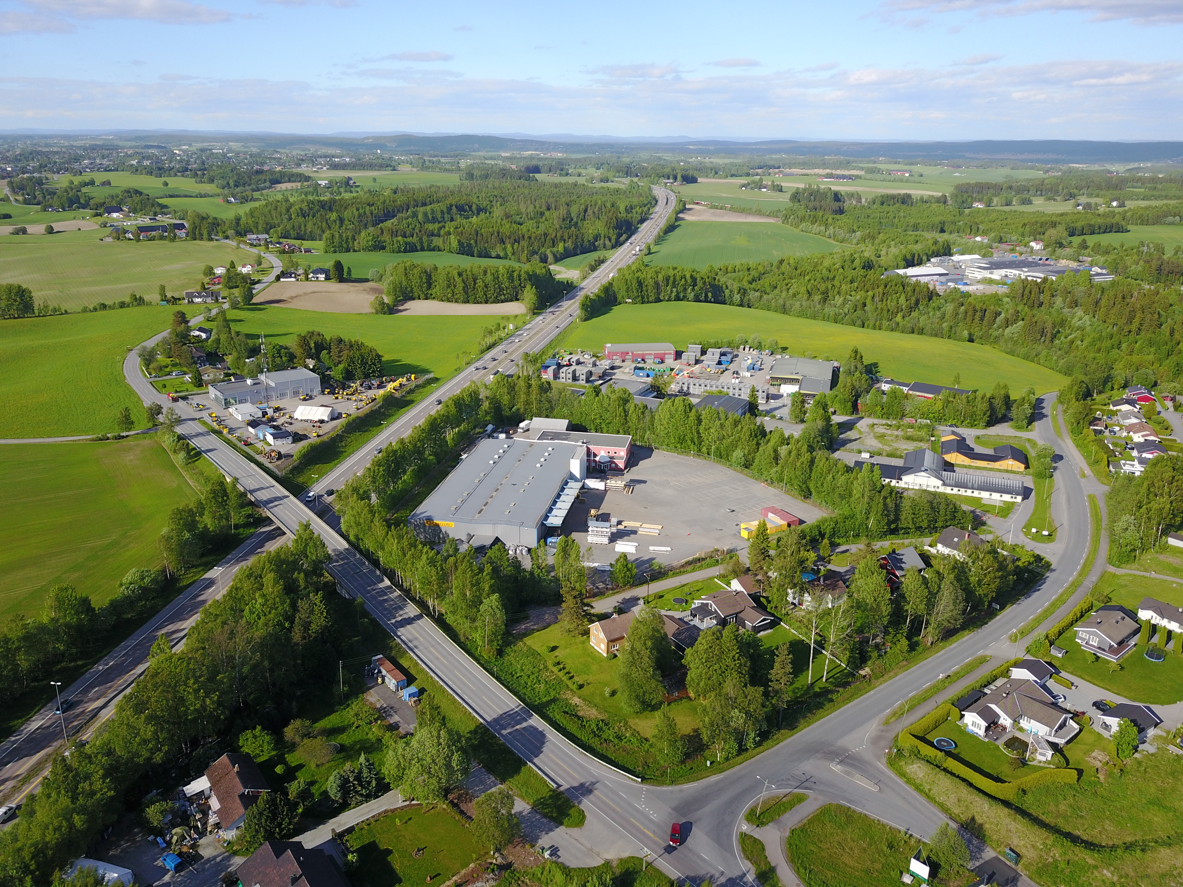 Fylkesvei 260 i Akershus